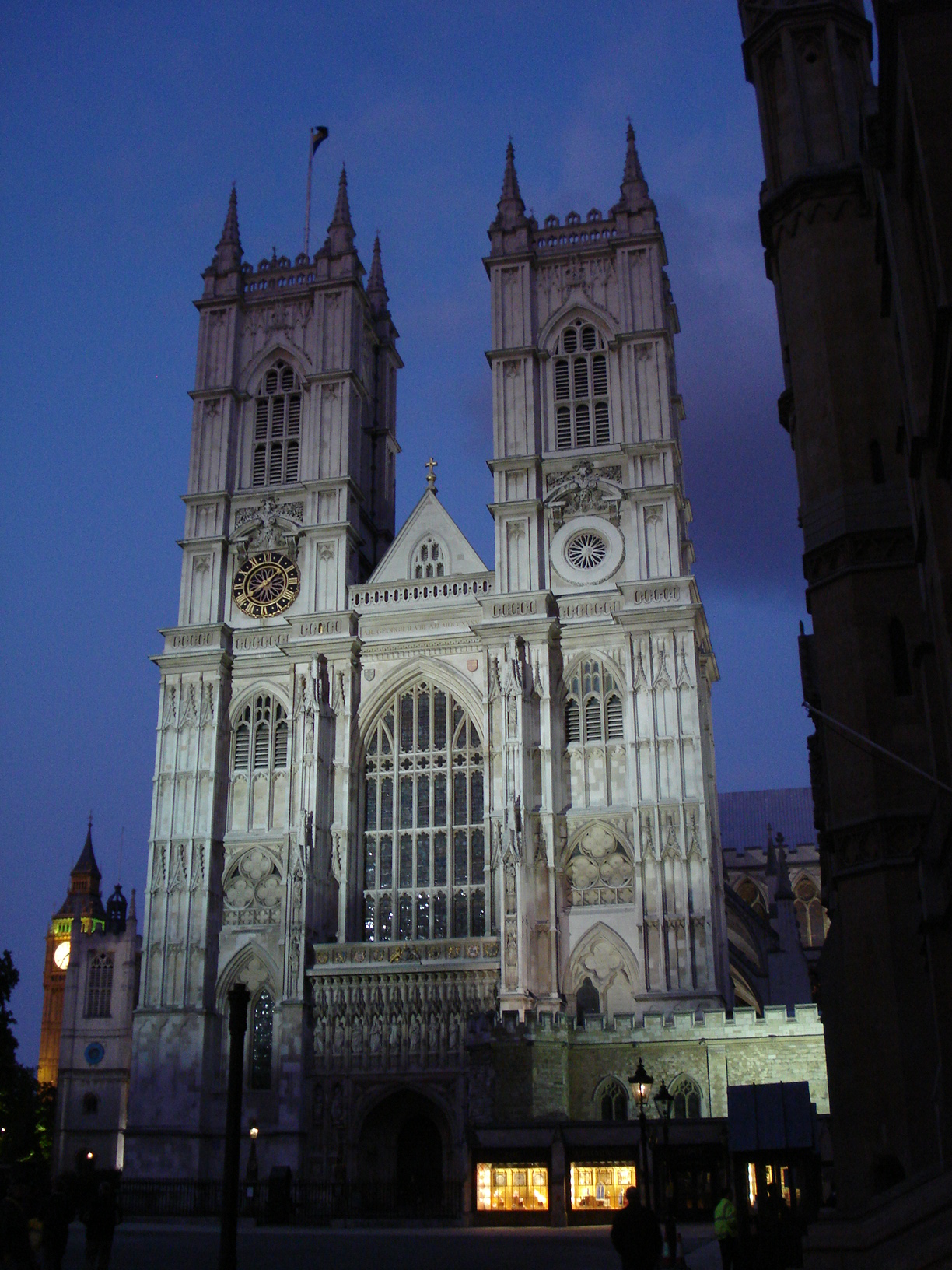 Wetsportal der Westminster Abbey